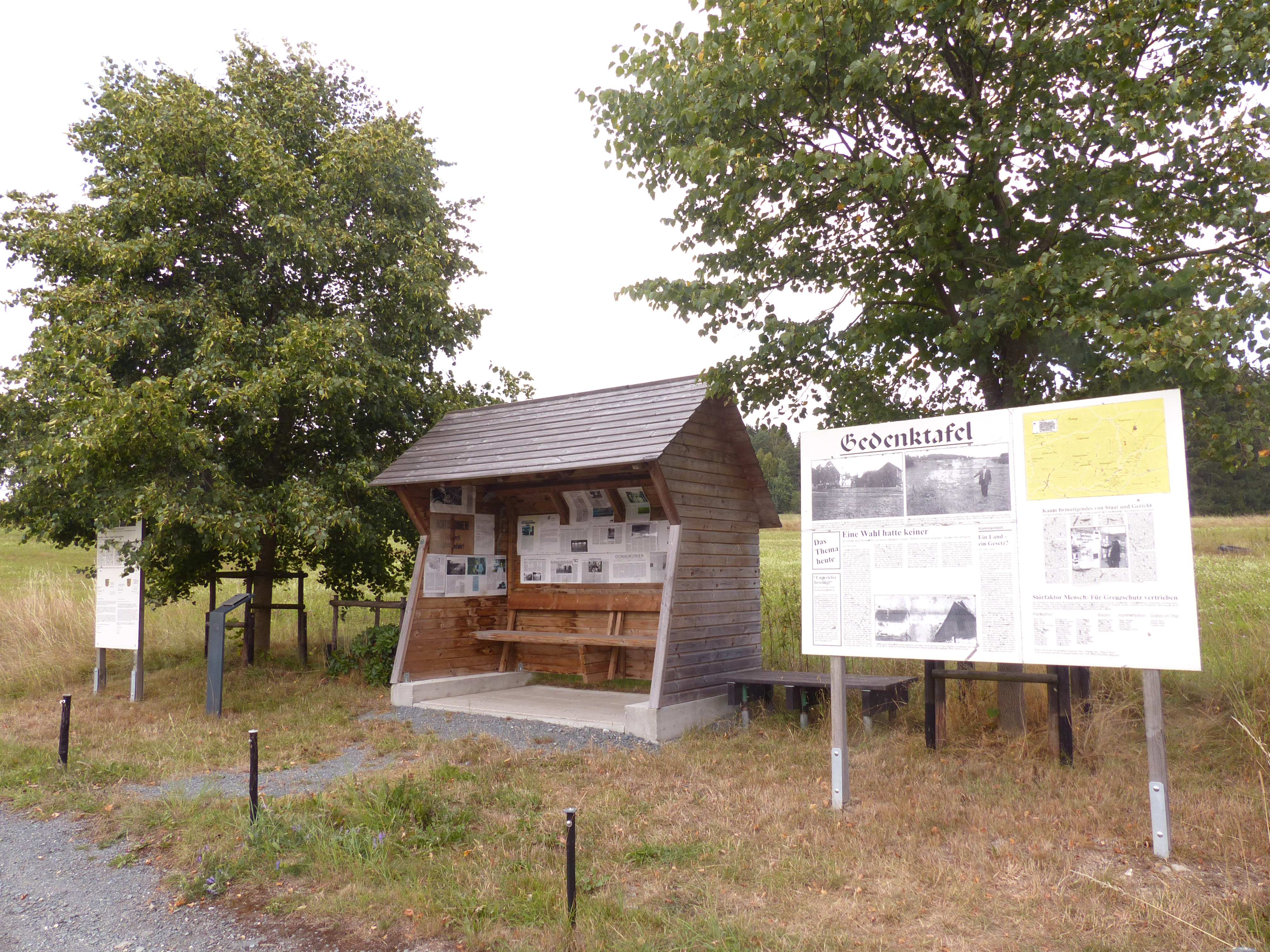 Bushäuschen am Standort der Wüstung Hammerleithen als Erinnerungskultur, der Ort verschwand zur Sicherung der DDR Grenze